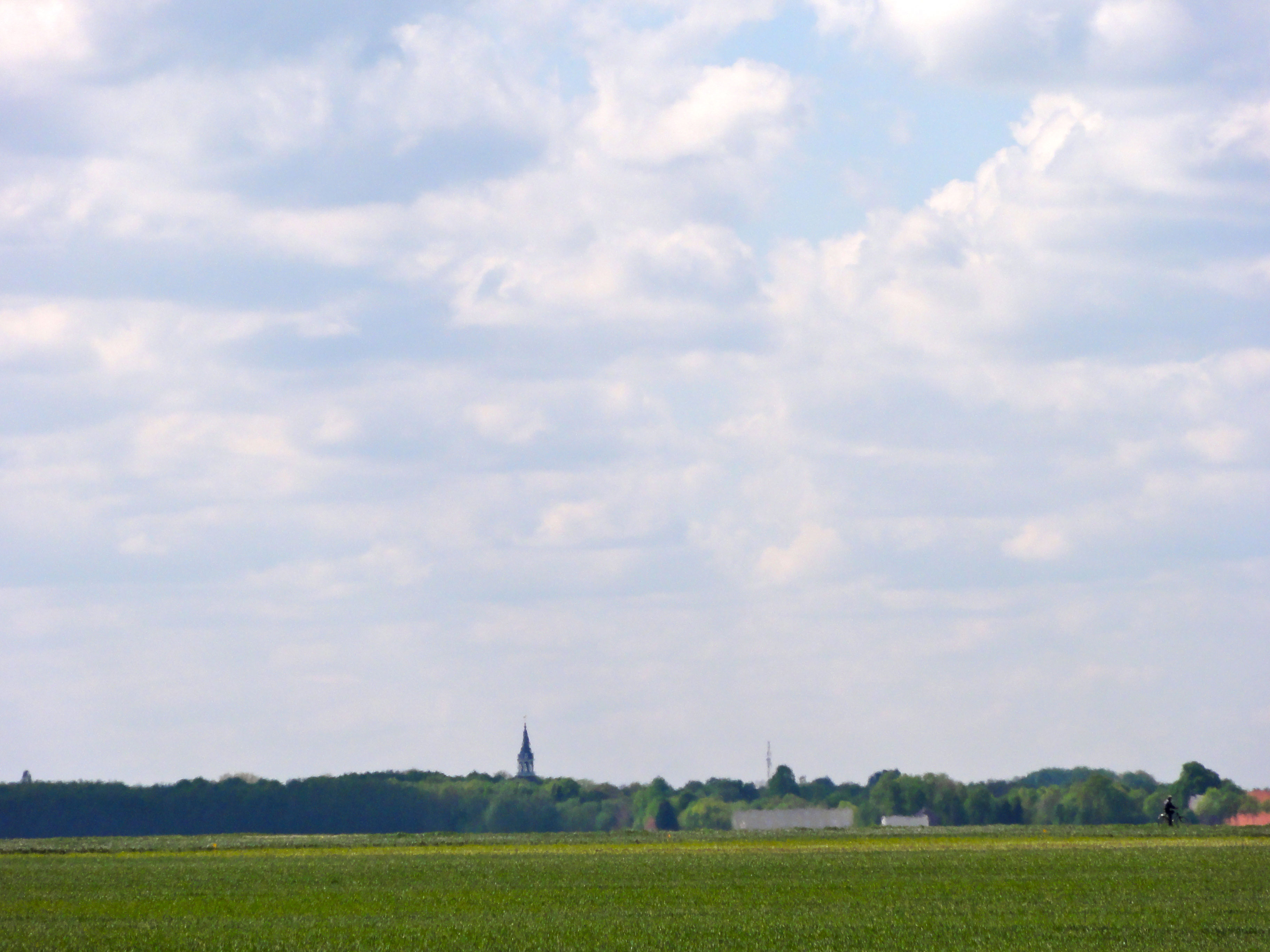 Zicht op Finsterwolde